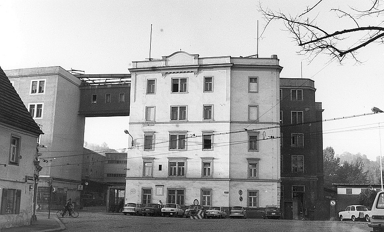 Original image description from the Deutsche Fotothek Dresden-Plauen. Bienertmühle (frühere Hofmühle)